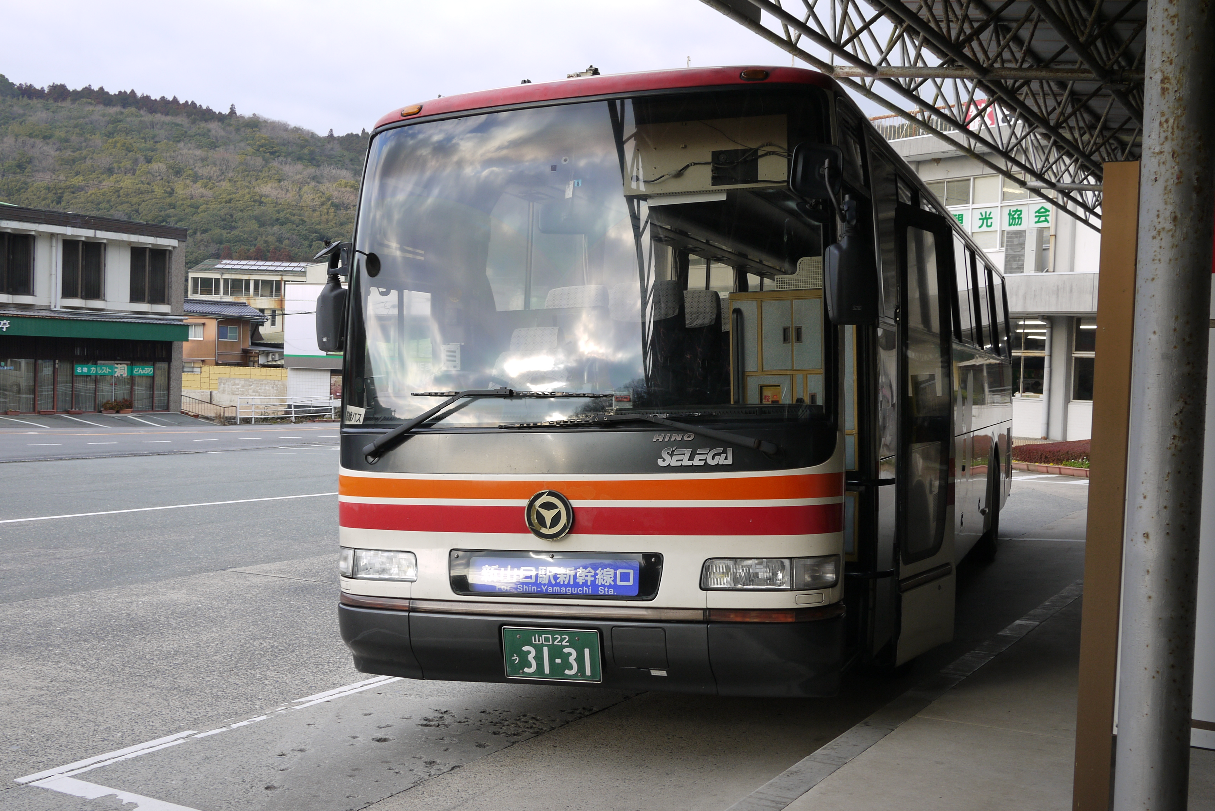 防長交通 秋芳洞バスセンターにて